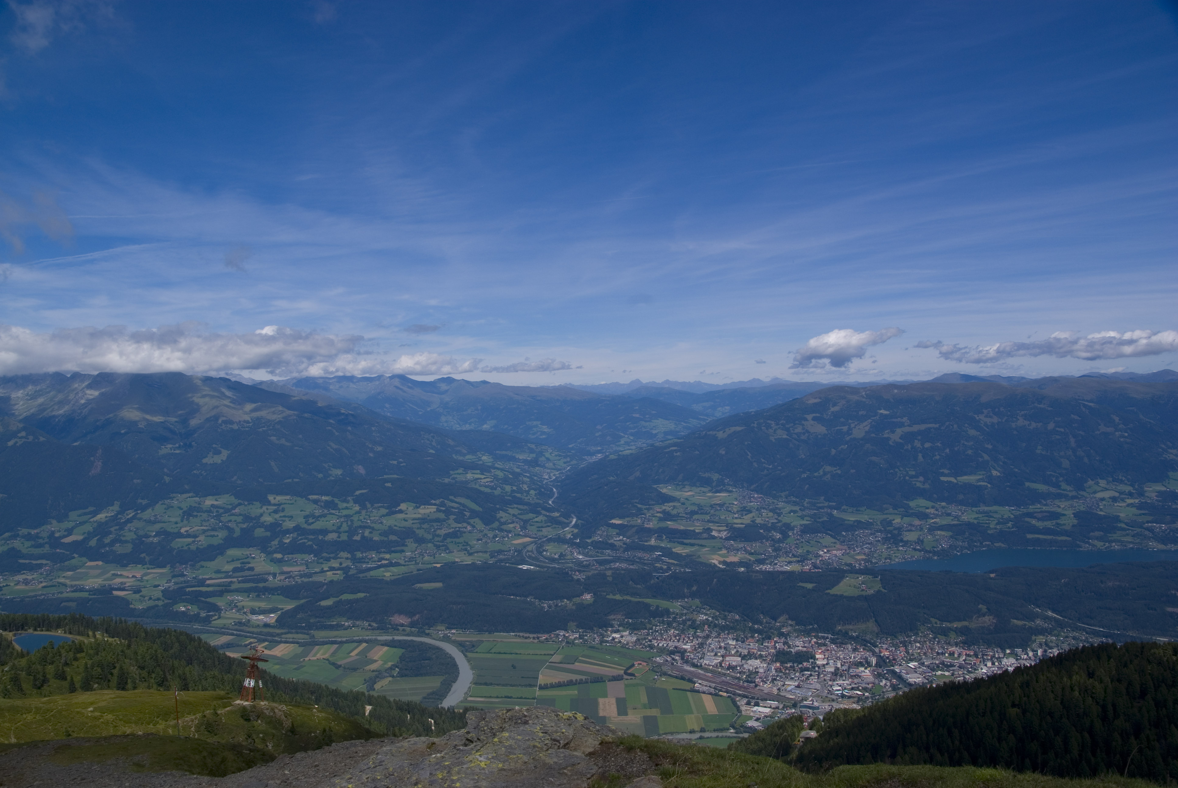 Blick vom Goldeck in Kärnten – unten rechts Spittal an der Drau, in der Bildmitte das Liesertal, rechts der Millstätter See.